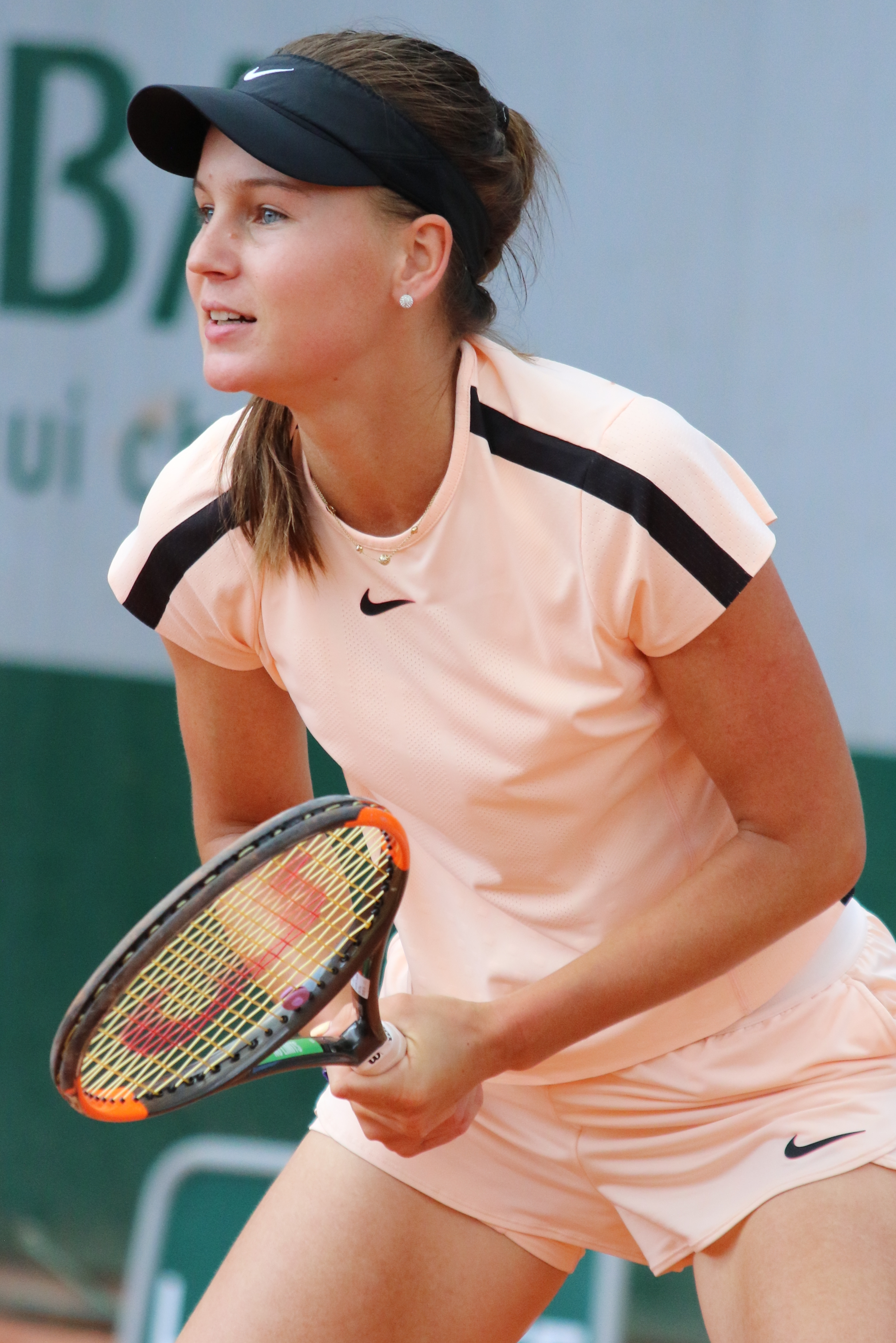 Kudermetova RG18 (26)